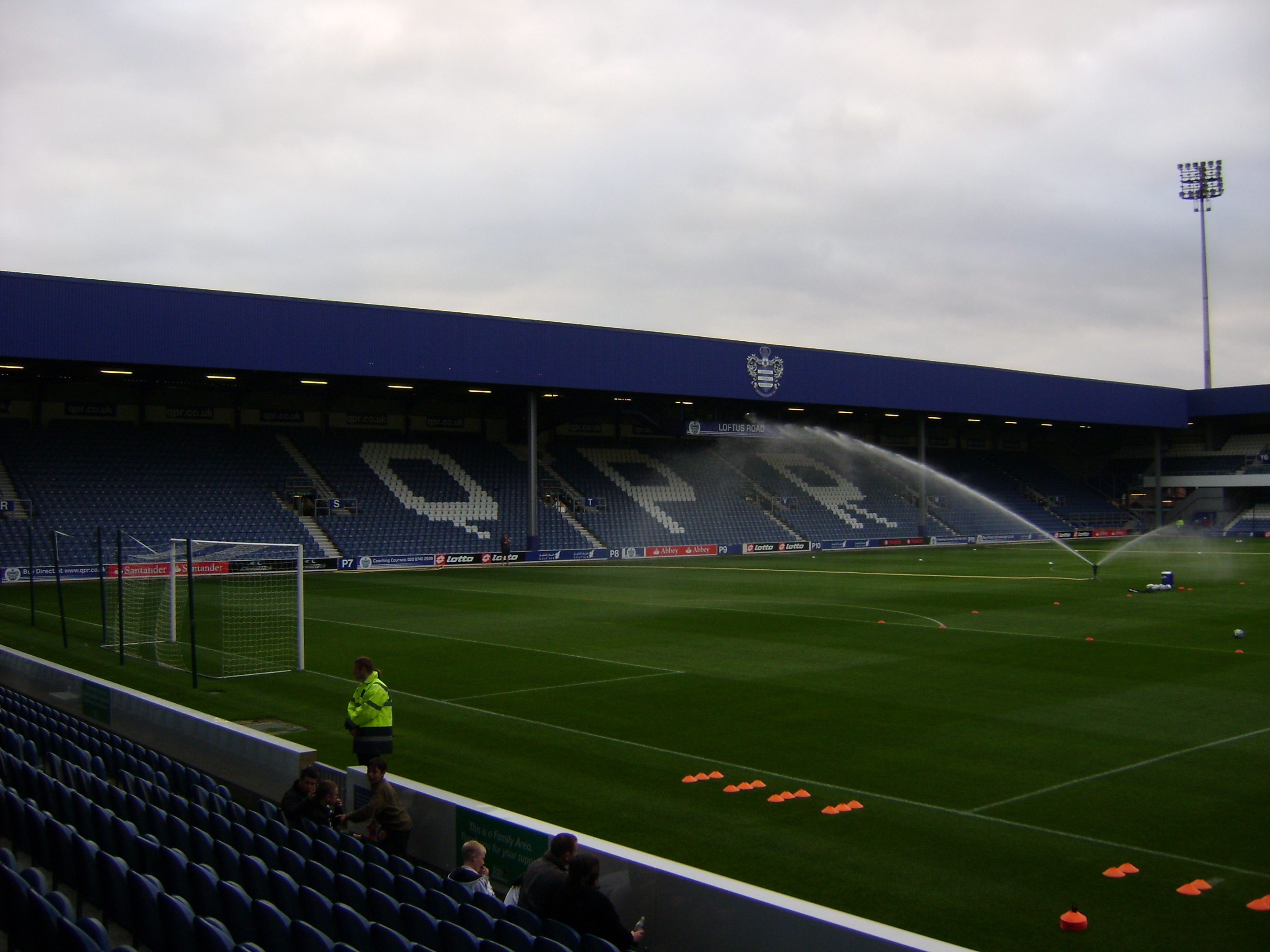 Ellersie Road Stand - DSC00489